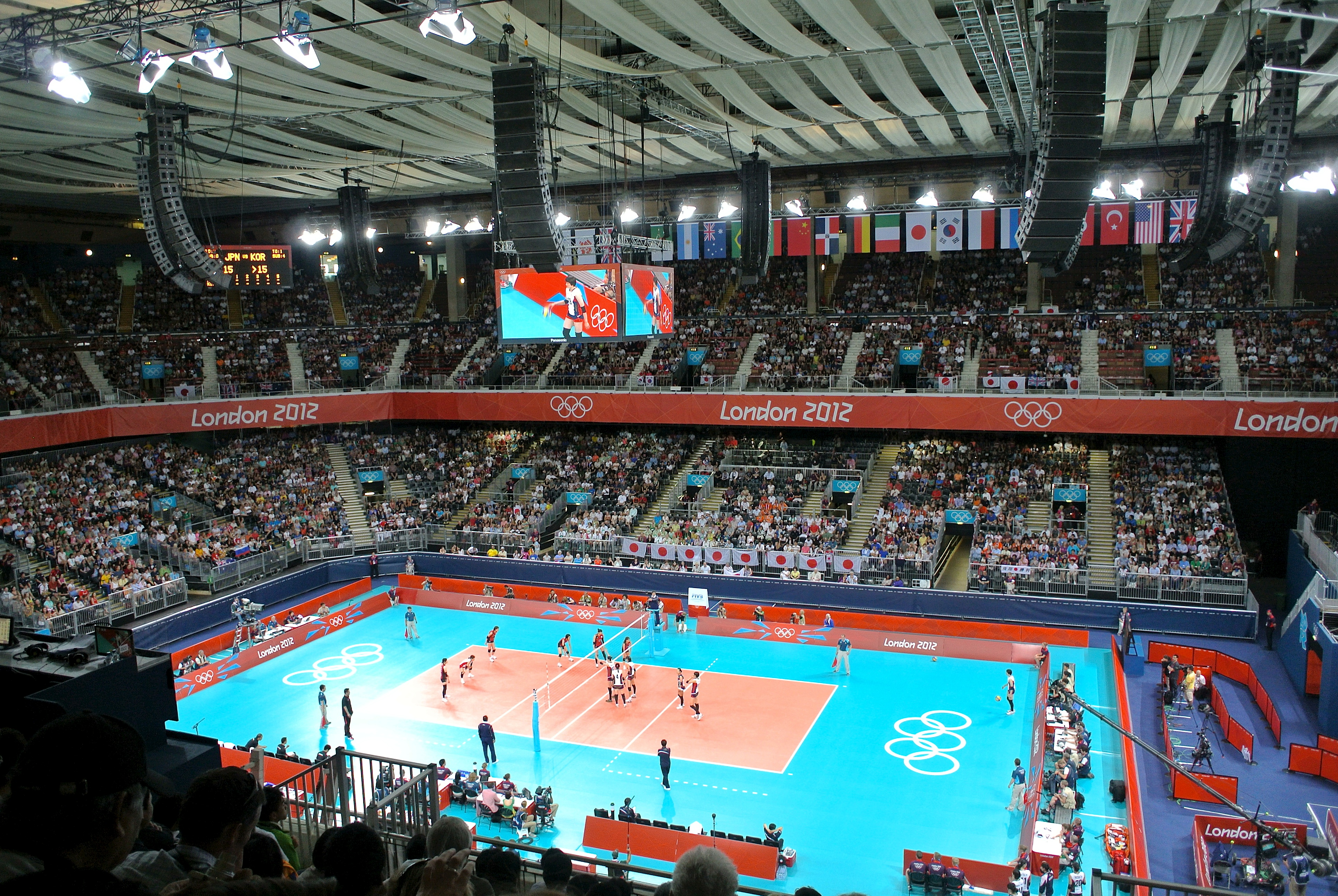 women's volleyball.